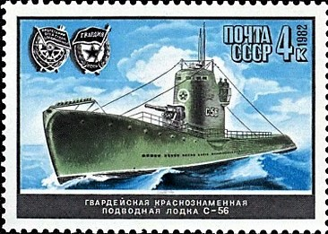 Почтовая марка СССР. Подводная лодка С-56. Номер в каталоге ЦФА 5334